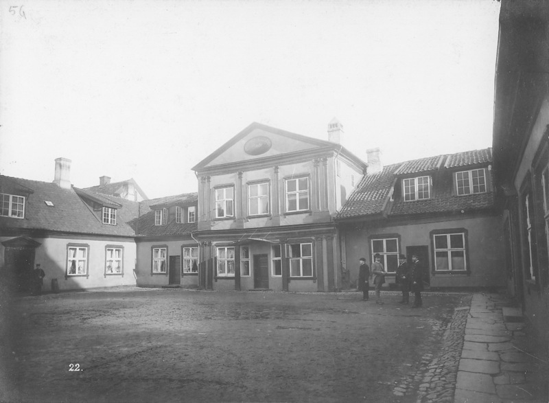 Mangelsgården, gårdsplass, menn.